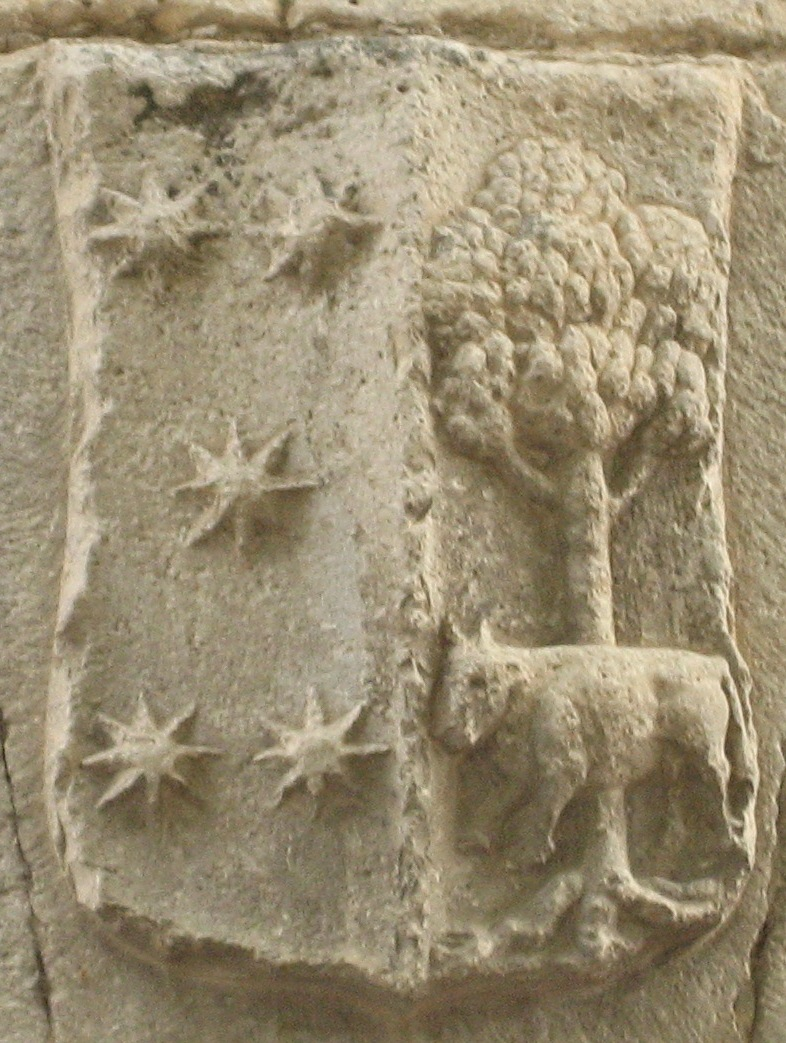 Escudo de armas de los fundadores del convento de la Concepción de Cuéllar.